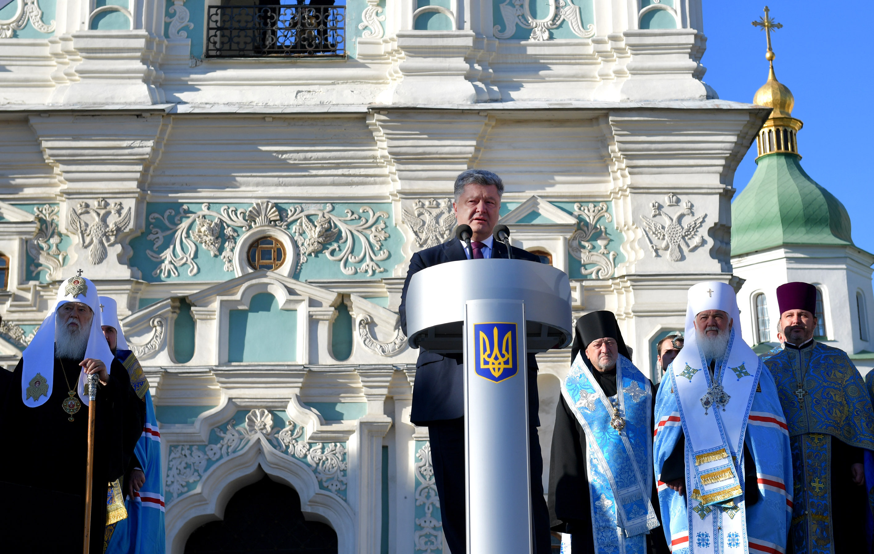 Участь Президента у заходах до Дня захисника України